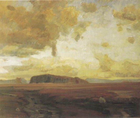 Moorlandschaft. Öl auf Leinwand. 85 x 104,5 cm. Besitzer: Landessparkasse zu Oldenburg